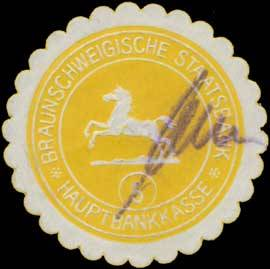 Sealing stamp Title: Braunschweigische Staatsbank Hauptkasse 5 Description: gelb, weiß, geprägt Place: Braunschweig size: 4 cm